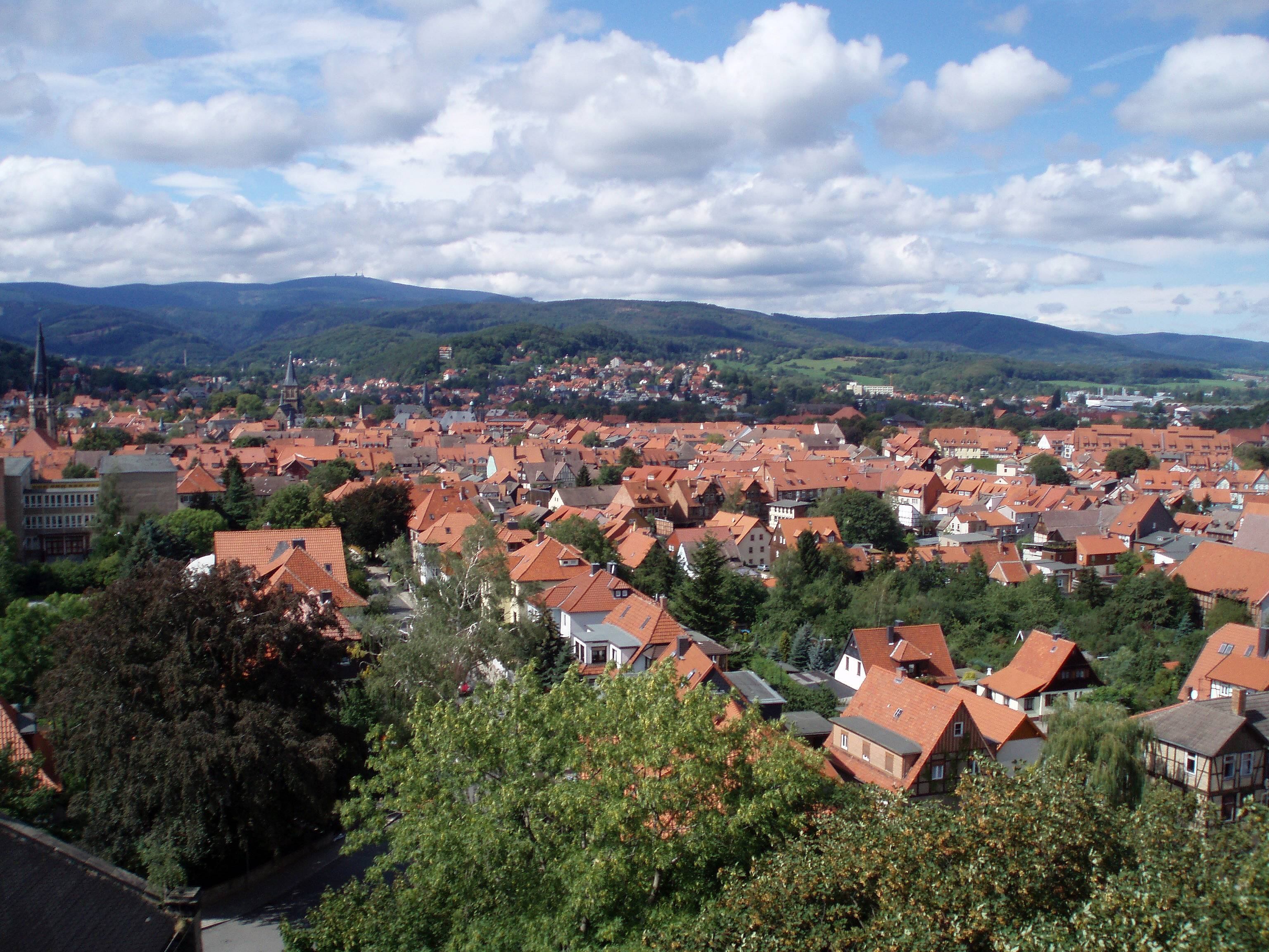 Wernigerode am Fuße des Brockens